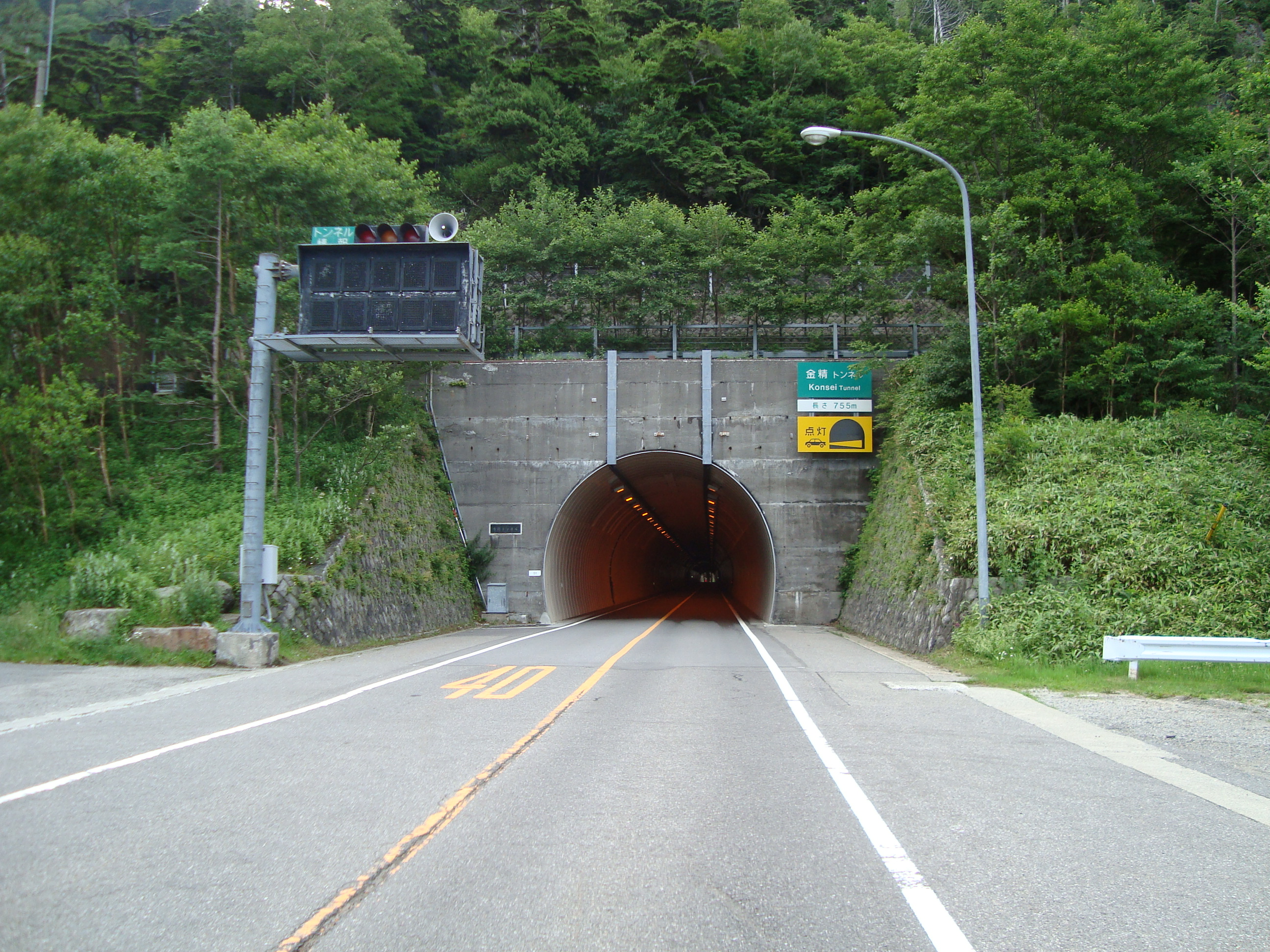 国道120号金精道路 金精トンネル（日光側）